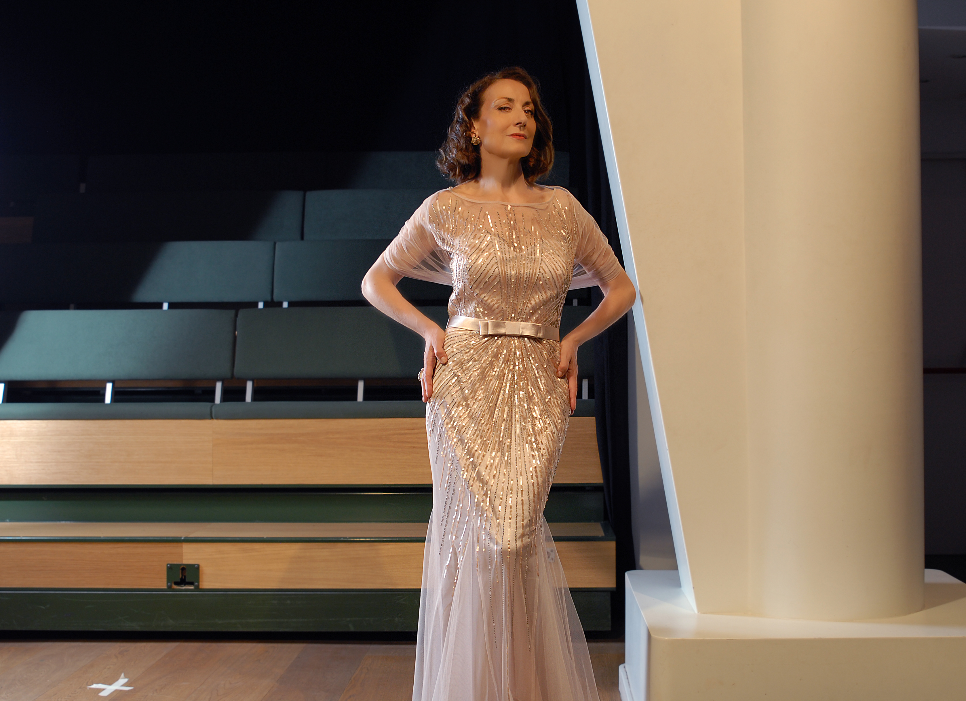 Carme Elias